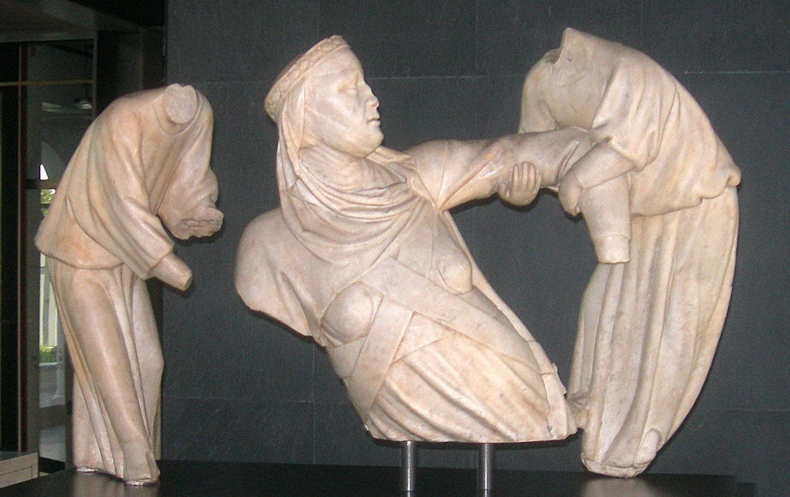 Foto scattata nel museo di Sant'Agostino a Genova